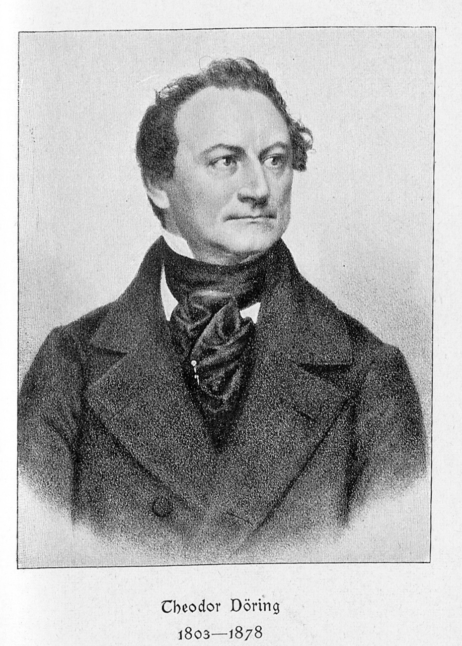 Aus Spemanns goldenes Buch des Theaters (1902), Scan --Goerdten 11:23, 4. Mär. 2007 (CET)